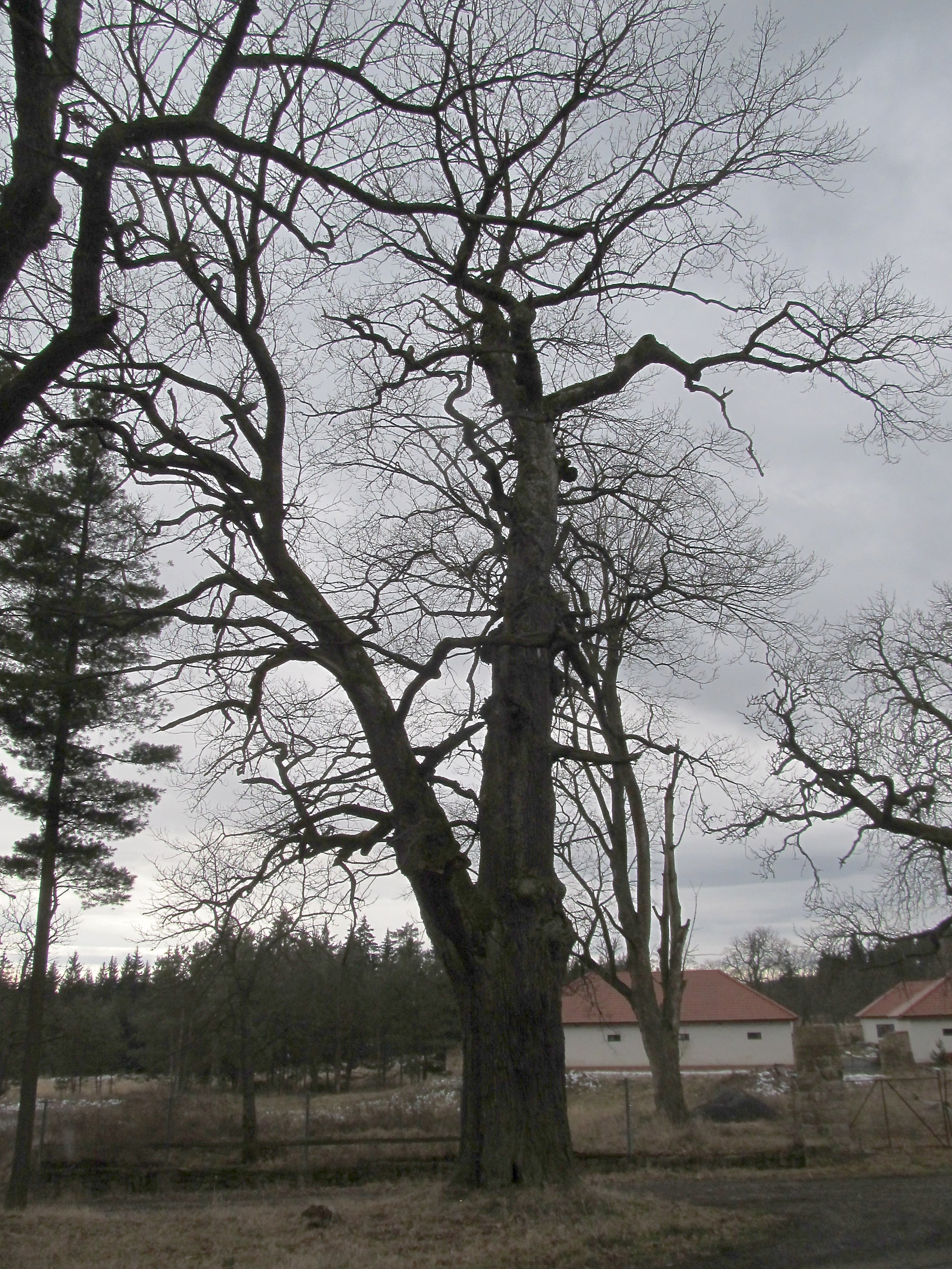 Libenov - chráněný dub